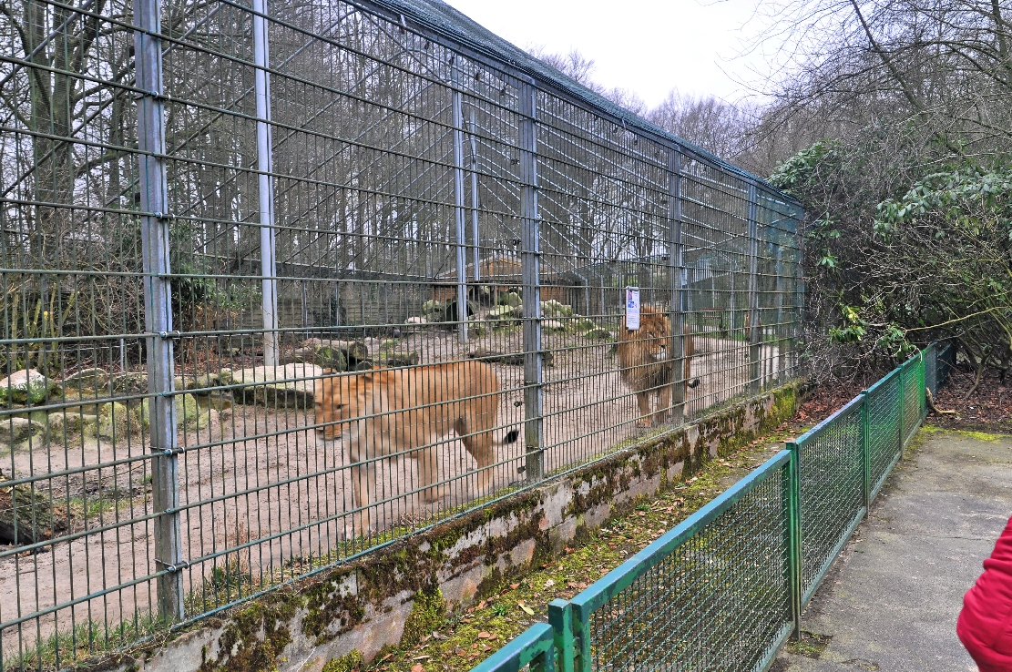 Zoo in der Wingst 2014